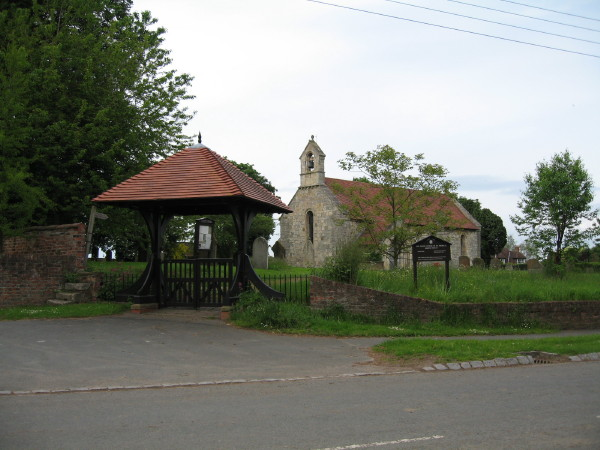 Askham Bryan